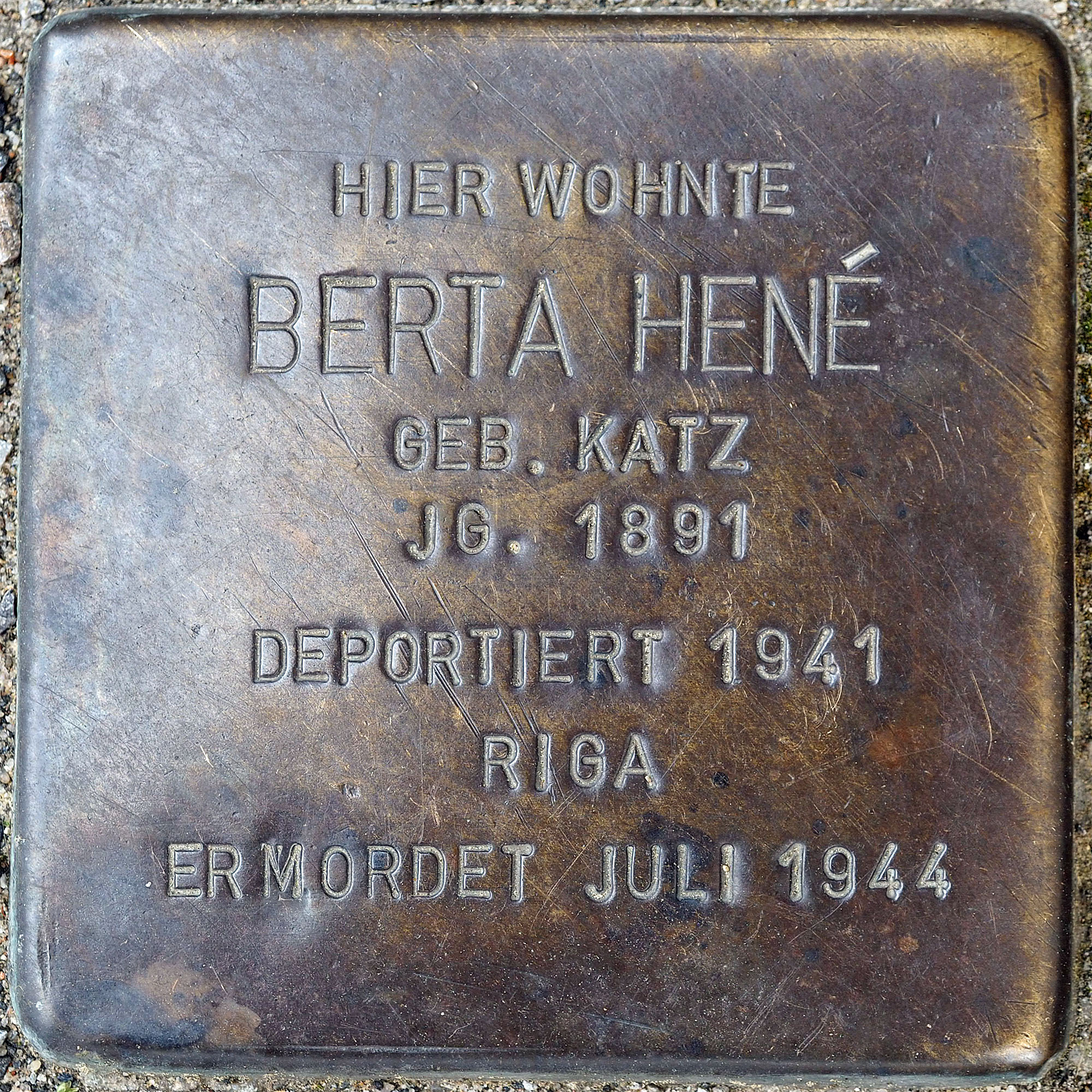 Stolpersteine MG: Hene, Berta